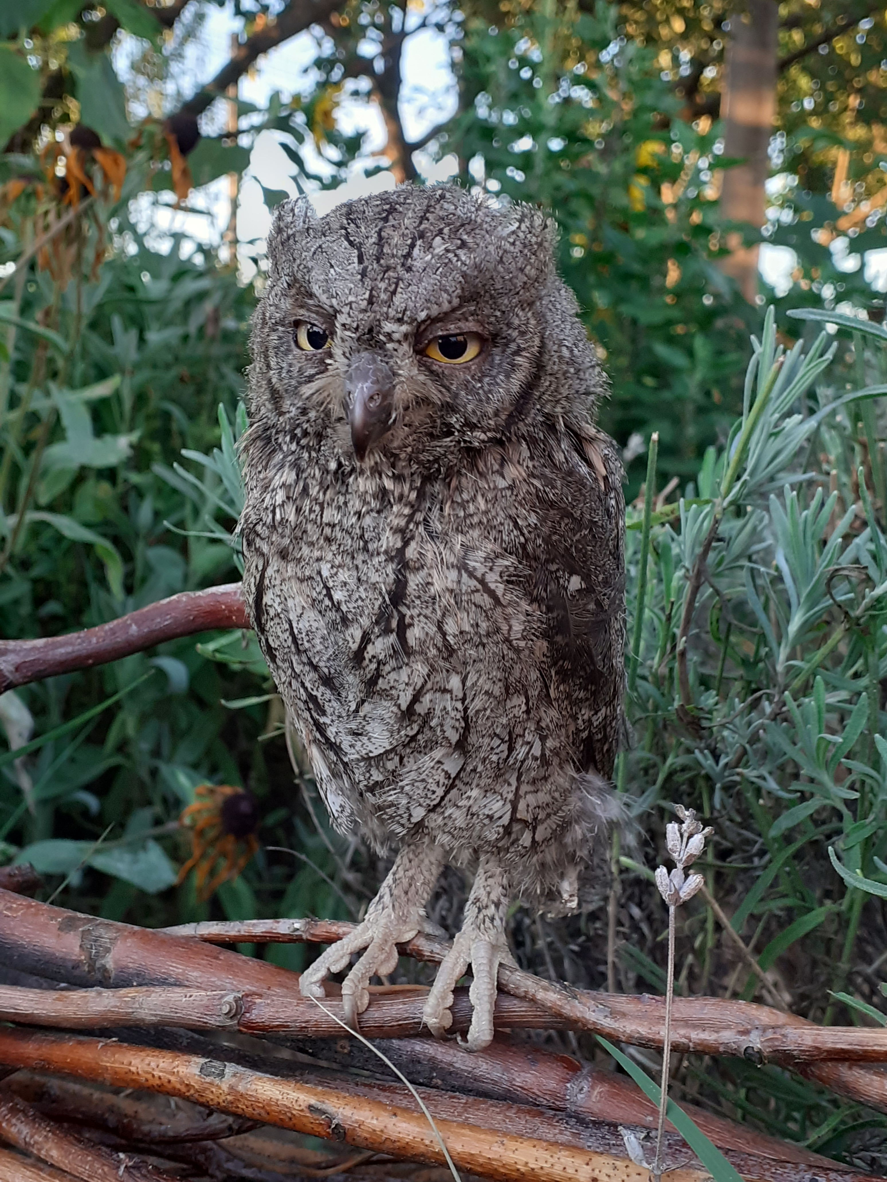 Pui de cius